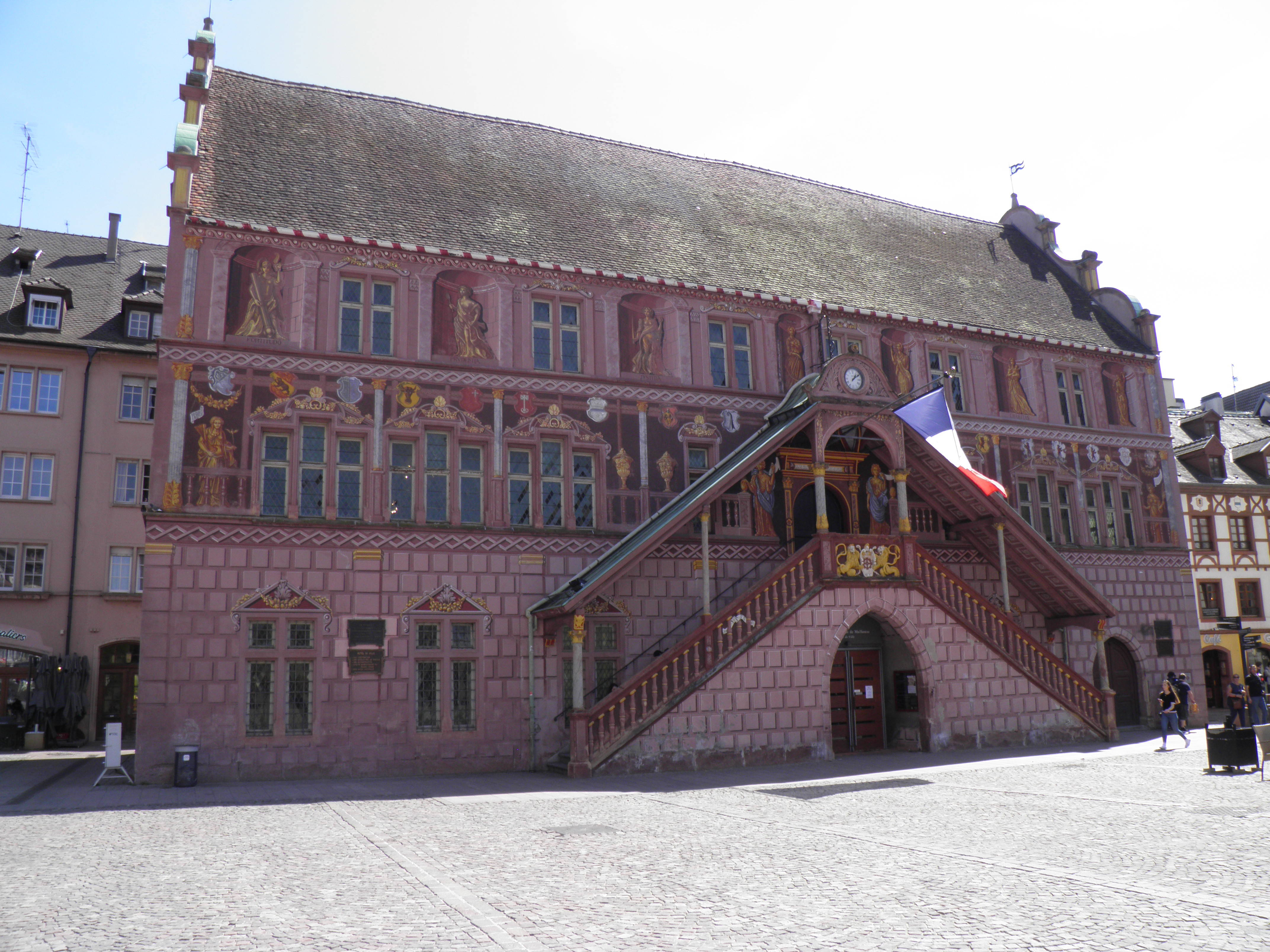 Hôtel de ville de Mulhouse (Haut-Rhin, France).